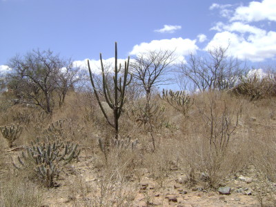 Caatinga (do tupi: ka'a [mata] + tinga [branca] = mata branca) é o único bioma[nota 1] exclusivamente brasileiro, o que significa que grande parte do seu patrimônio biológico não pode ser encontrado em nenhum outro lugar do planeta. Este nome decorre da paisagem esbranquiçada apresentada pela vegetação durante o período seco: a maioria das plantas perde as folhas e os troncos tornam-se esbranquiçados e secos. A caatinga ocupa uma área de cerca de 850.000 km², cerca de 10% do território nacional, englobando de forma contínua parte dos estados da Paraíba, Piauí, Ceará, Rio Grande do Norte, Maranhão, Pernambuco, Alagoas, Sergipe, Bahia (região Nordeste do Brasil) e parte do norte de Minas Gerais (região Sudeste do Brasil).